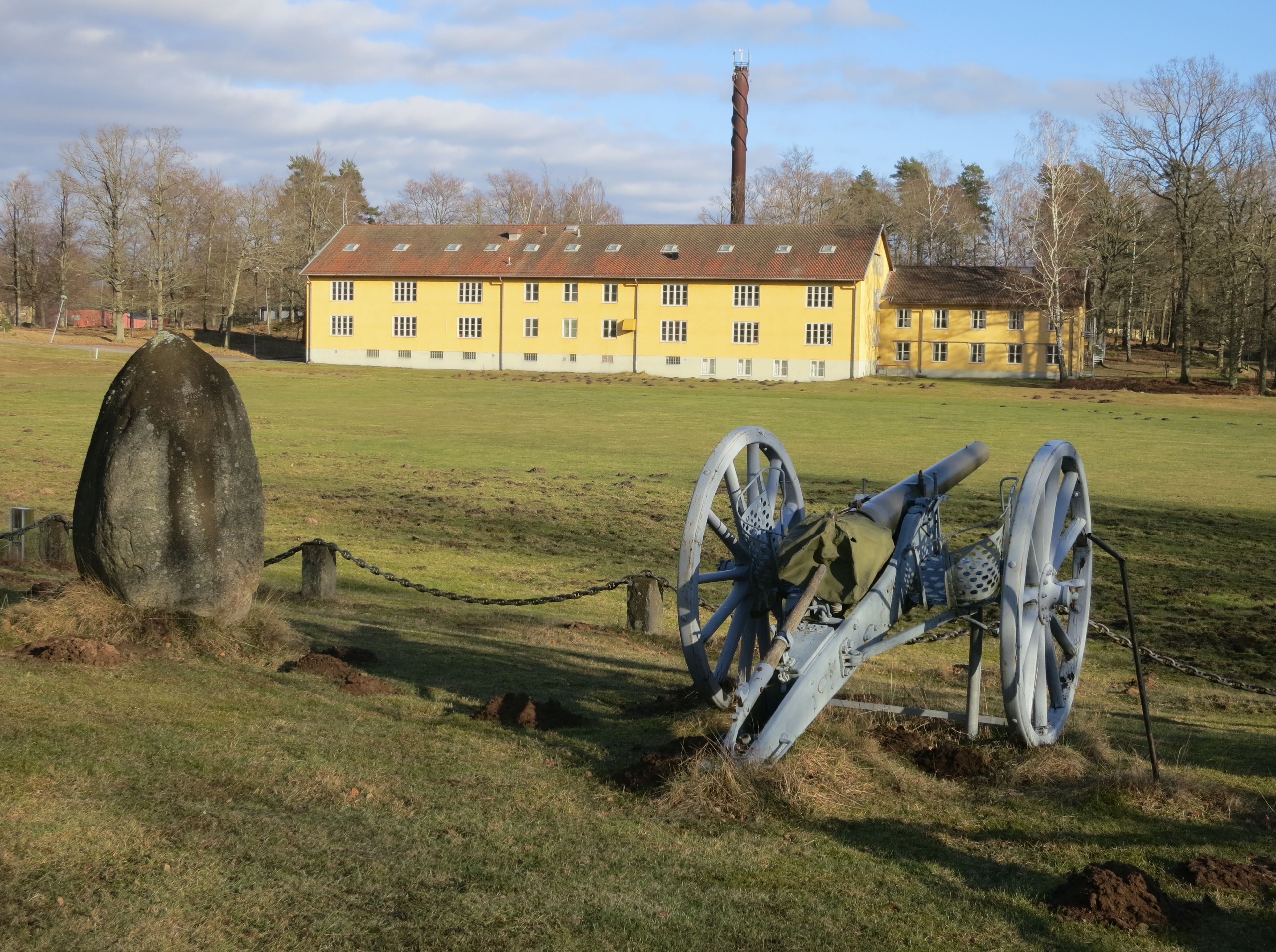 Skånska dragonregementet (P 2) fd lokaler